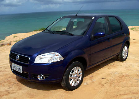 Fiat Palio 4ta generación.